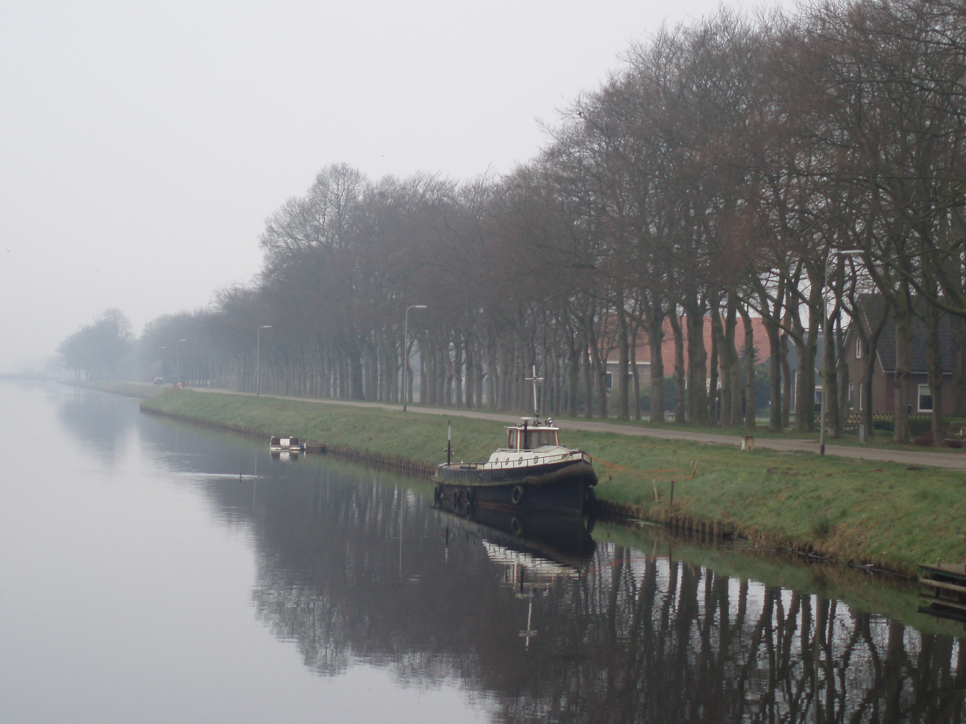 Het Stieltjeskanaal op een mistige ochtend in april. Gezien vanaf de brug nabij de Vaartweg in Nieuw-Amsterdam.